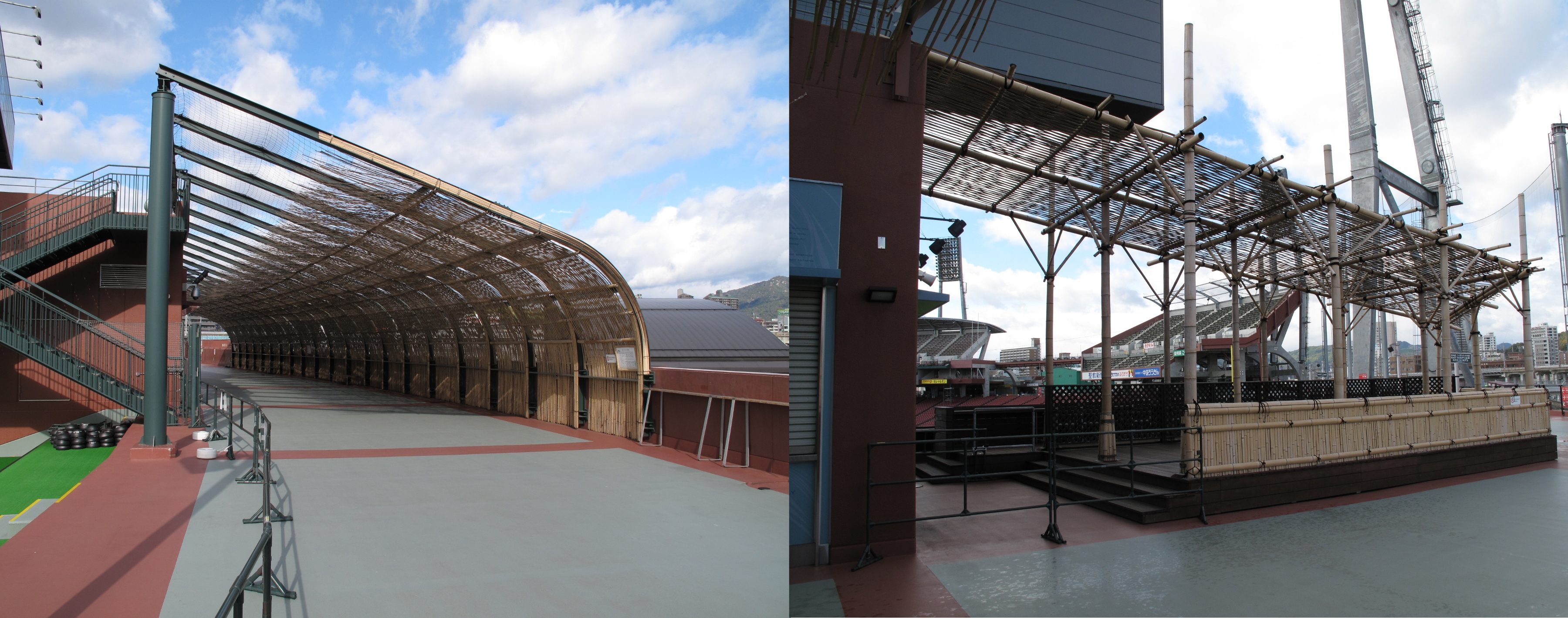 マツダスタジアム（広島市民球場）のスコアボード後方に設置されたパーゴラに竹製の日よけが制作された。2012年、竹細工で名を馳せる竹原市から提供されたものである。